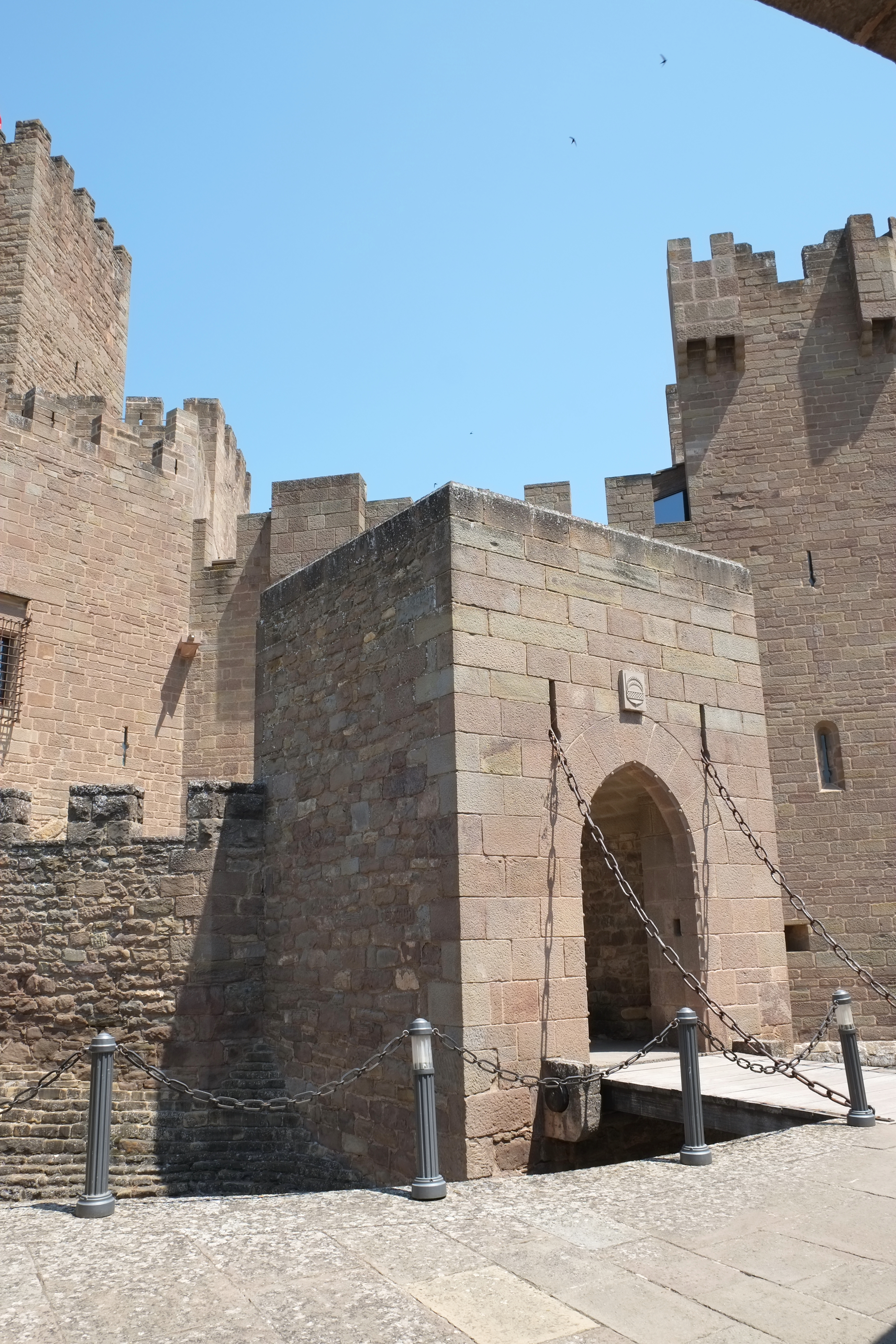 Burg in Javier in der Region Navarra (Spanien)